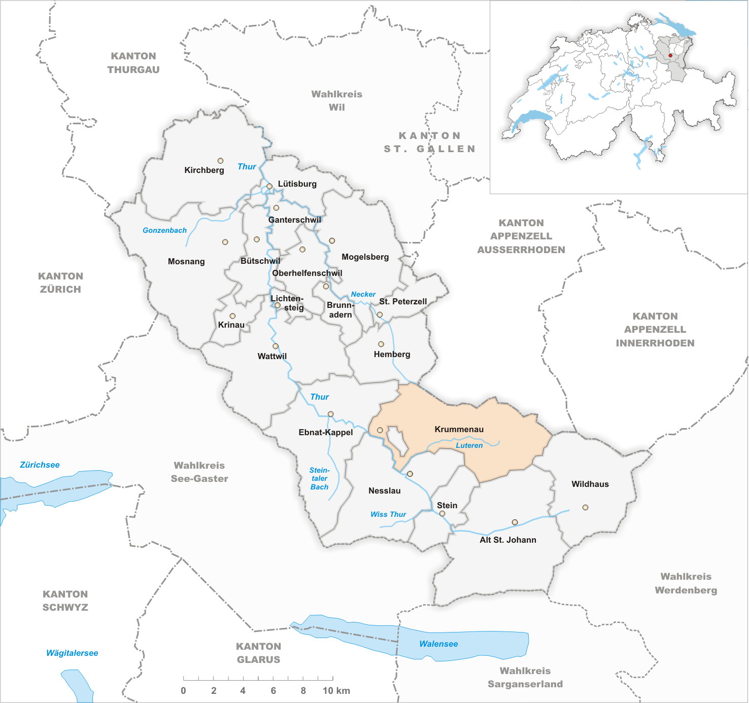 Municipality Krummenau Artist: Tschubby